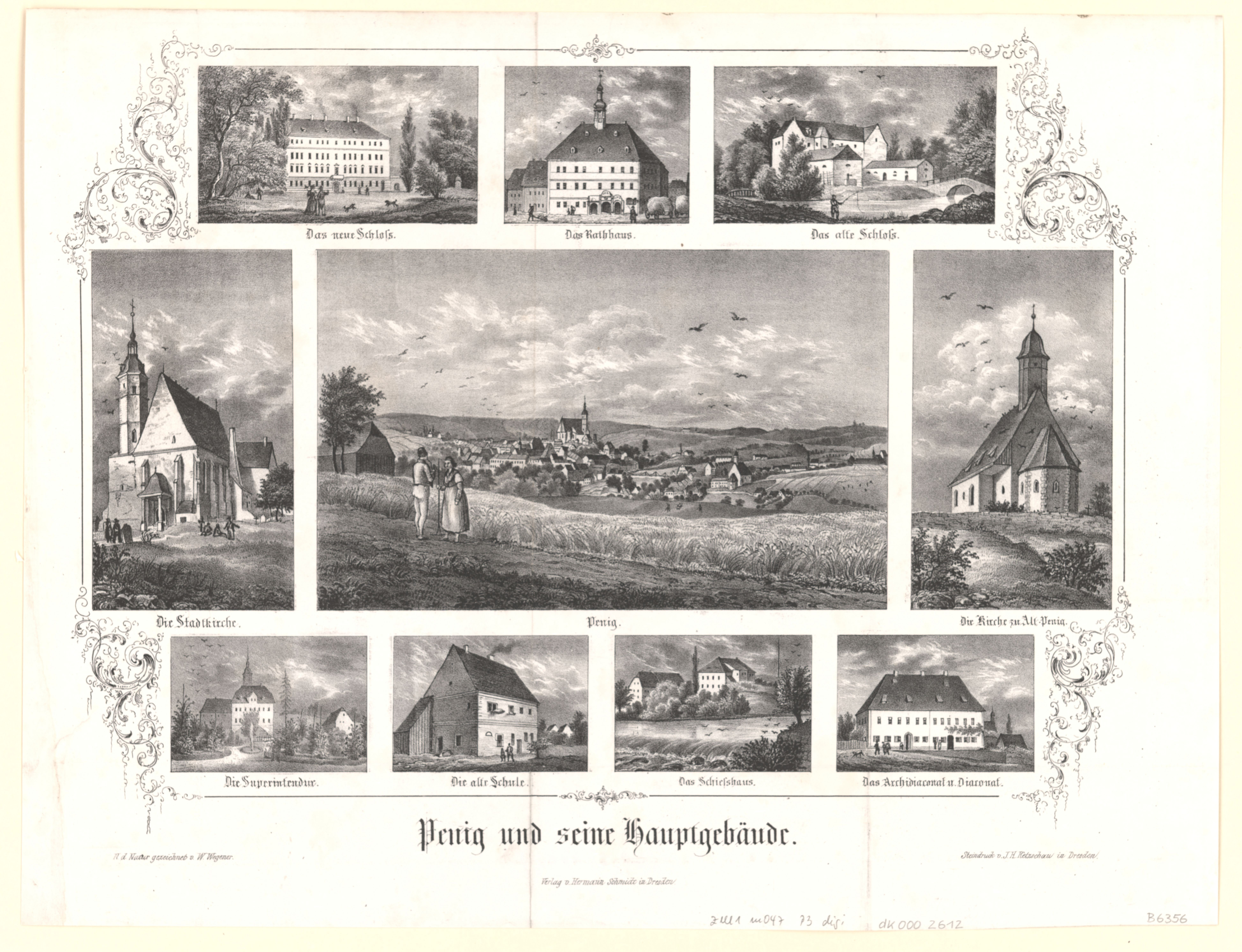 Penig und Hauptgebäude / n. d. Natur gezeichnet v. W. Wegener. - Dresden : Hermann Schmidt ; Dresden : J. H. Ketzschau, [um 1845]. - 10 Ansichten auf 1 Kunstblatt : Lithogr. ; Gesamtgr. 34 x 24 cm. - 1 Gesamtansicht mit 9 Detailansichten